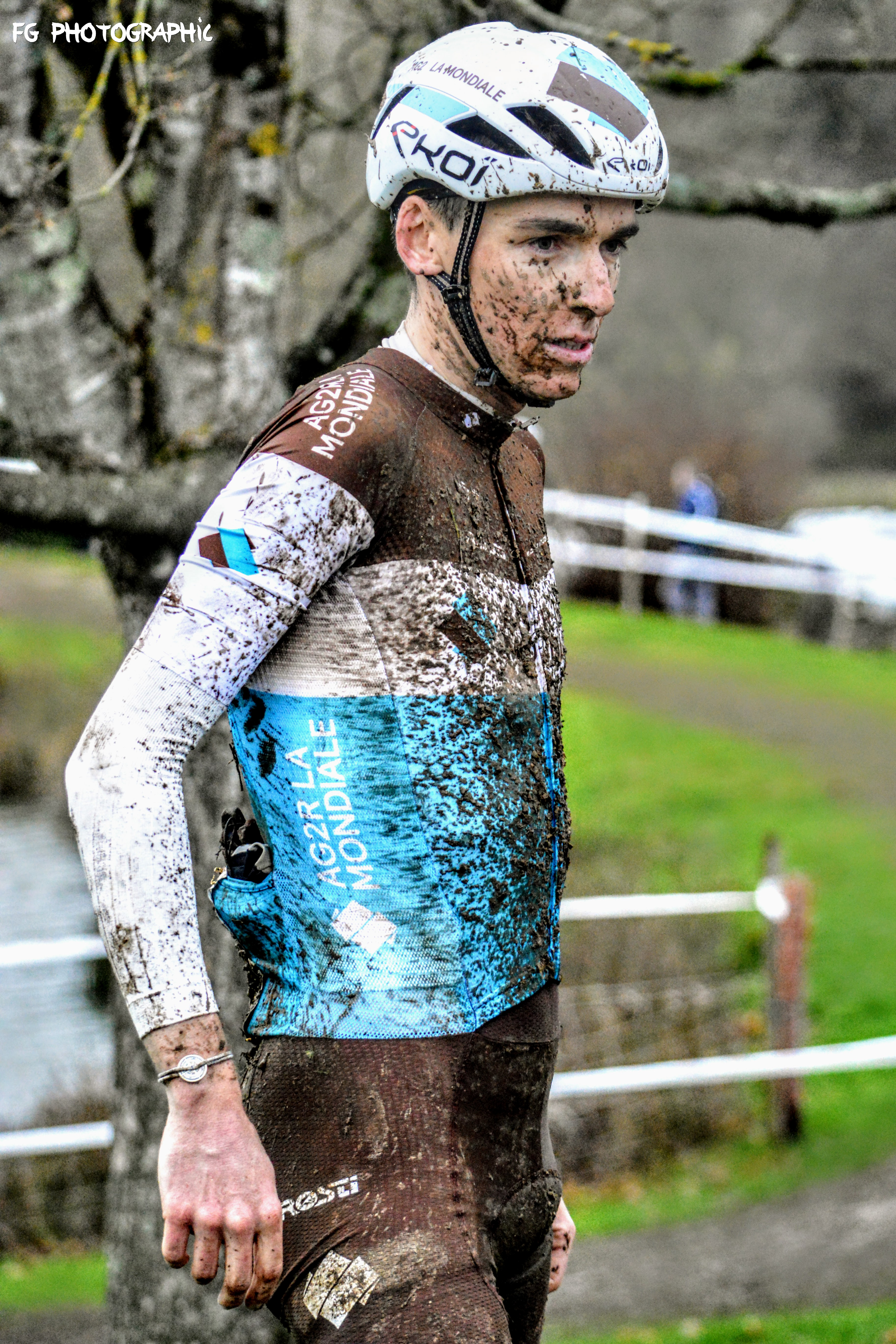 Romain BARDET - Décembre 2019